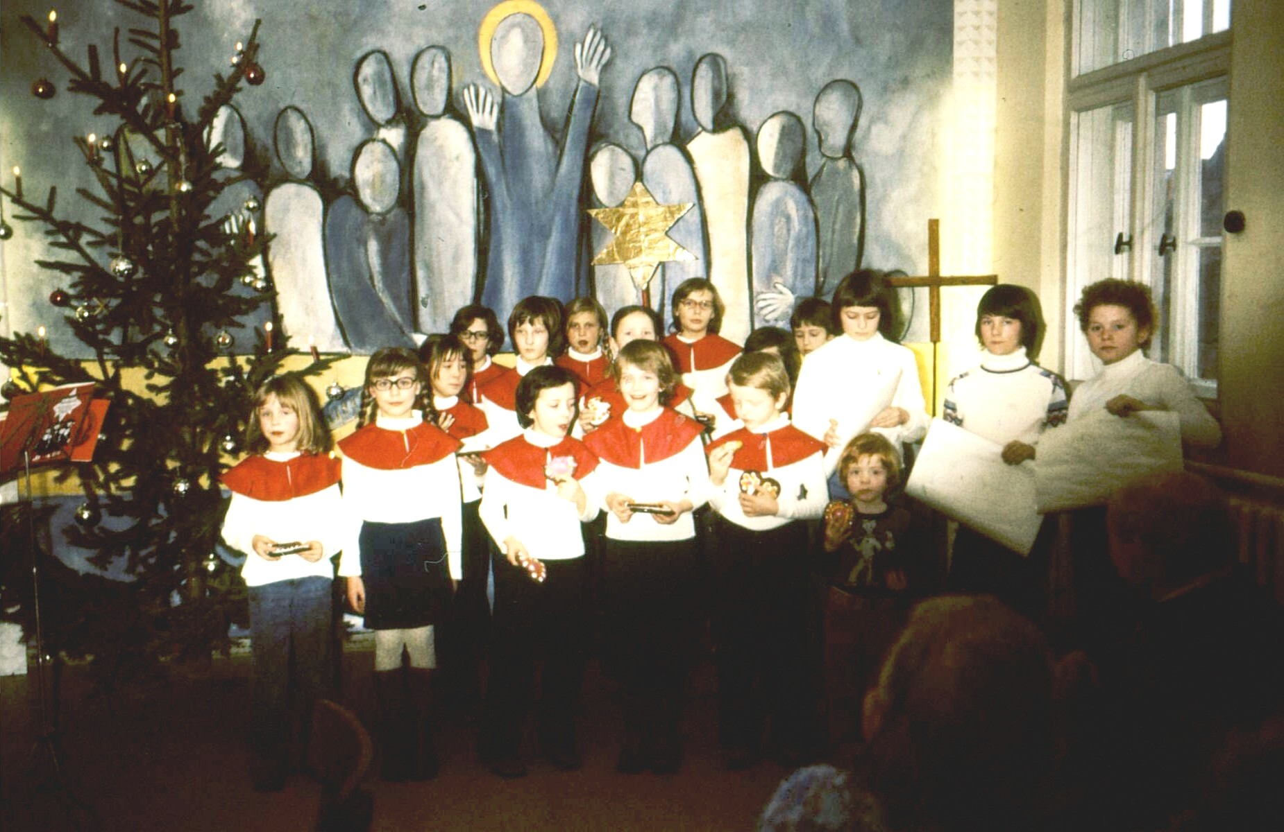 Wandbild "Abendmahl" im Evangelischen Gemeindezentrum "Thomas Müntzer" Kapellendorf, 1979